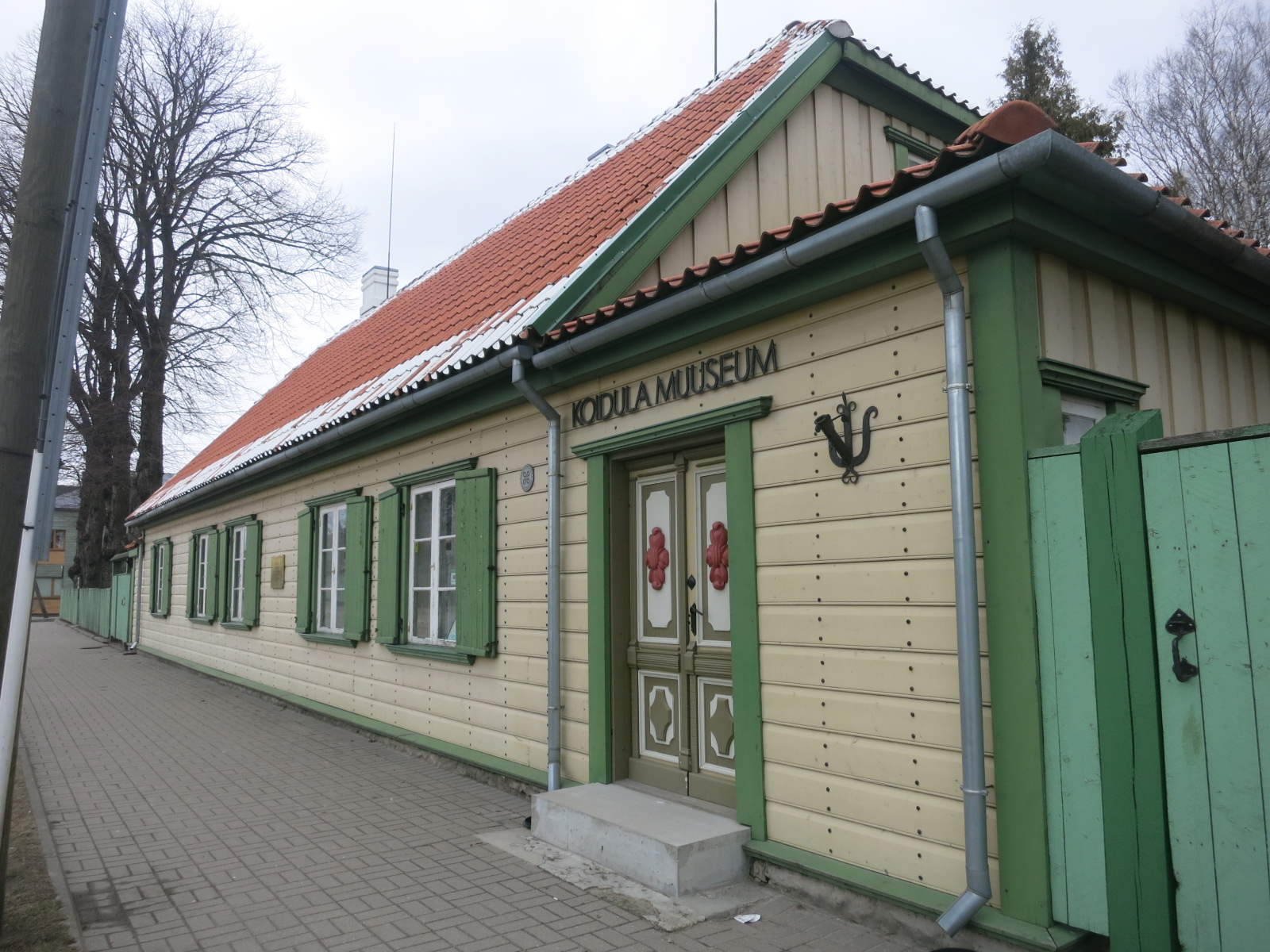 Lydia Koidula muuseum Pärnus